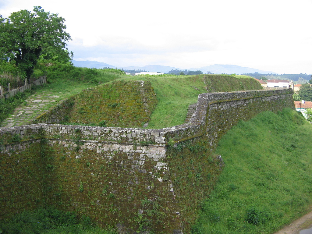 Muros da fortificação de Monção